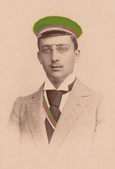 Max Gutknecht (* 30. Juni 1876 in Altenburg; † 3. Januar 1935 in Berlin) war ein deutscher Verwaltungsjurist, Politiker, Rittergutsbesitzer und Manager. Rückseitige Widmung: M(ax) Gutknecht (Zirkel der Franconia Tübingen) s(einem) l(ieben) Onkel Th. Schmidt z(ur) fr(eundlichen) Er(innerun)g, Tübingen S(ommer-)S(emester) 1895